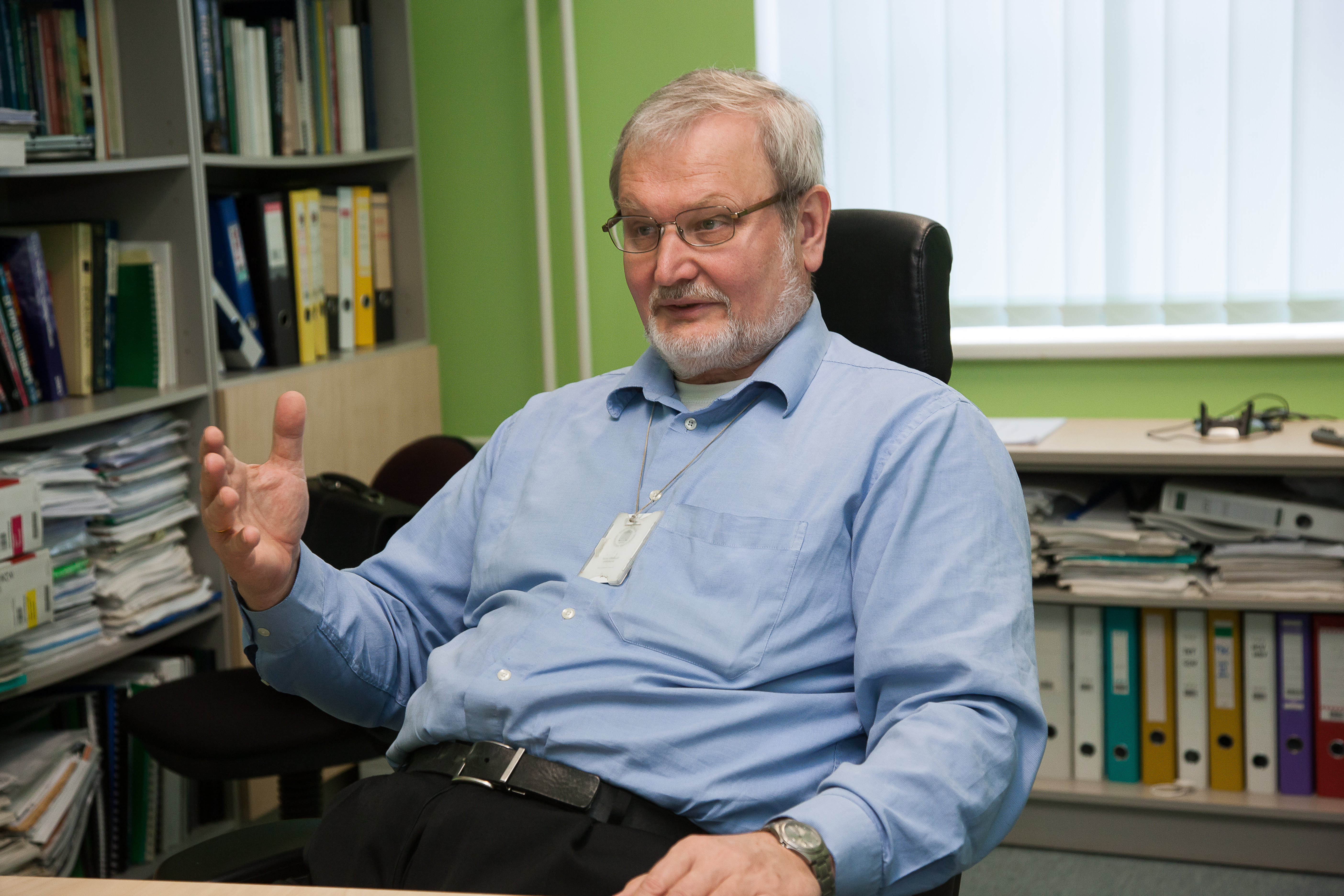 TÜ biomeditsiinitehnoloogia professor, akadeemik Mart Ustav.